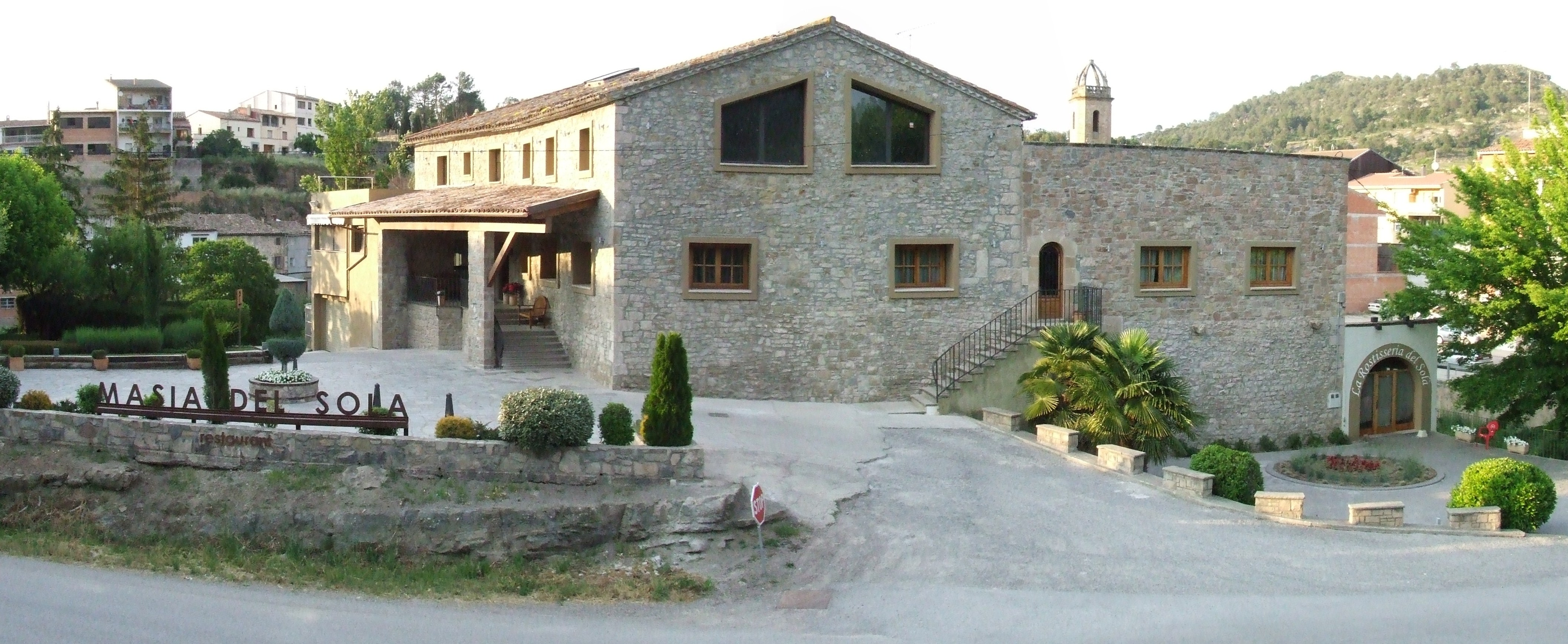 El Solà (Monistrol de Calders, Moianès)